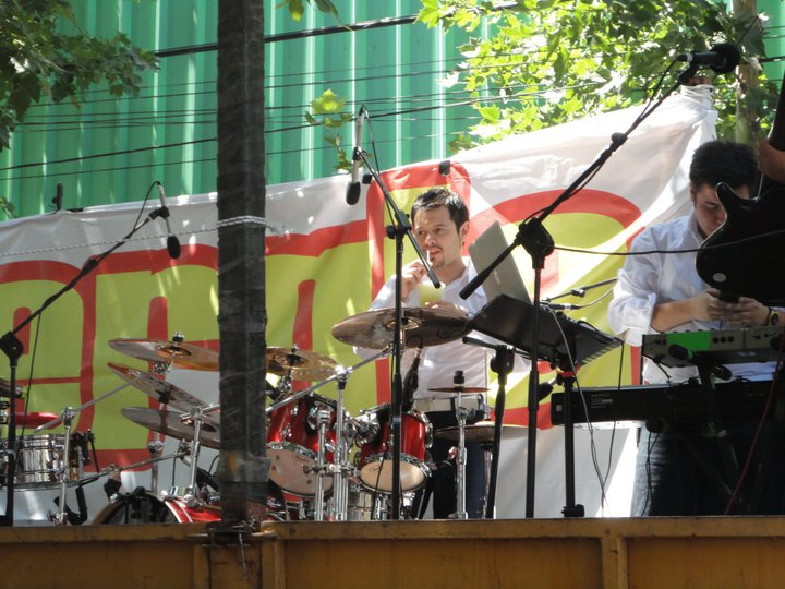 Bruno "Brunanza" Godoy en el Persa Bio-Bio